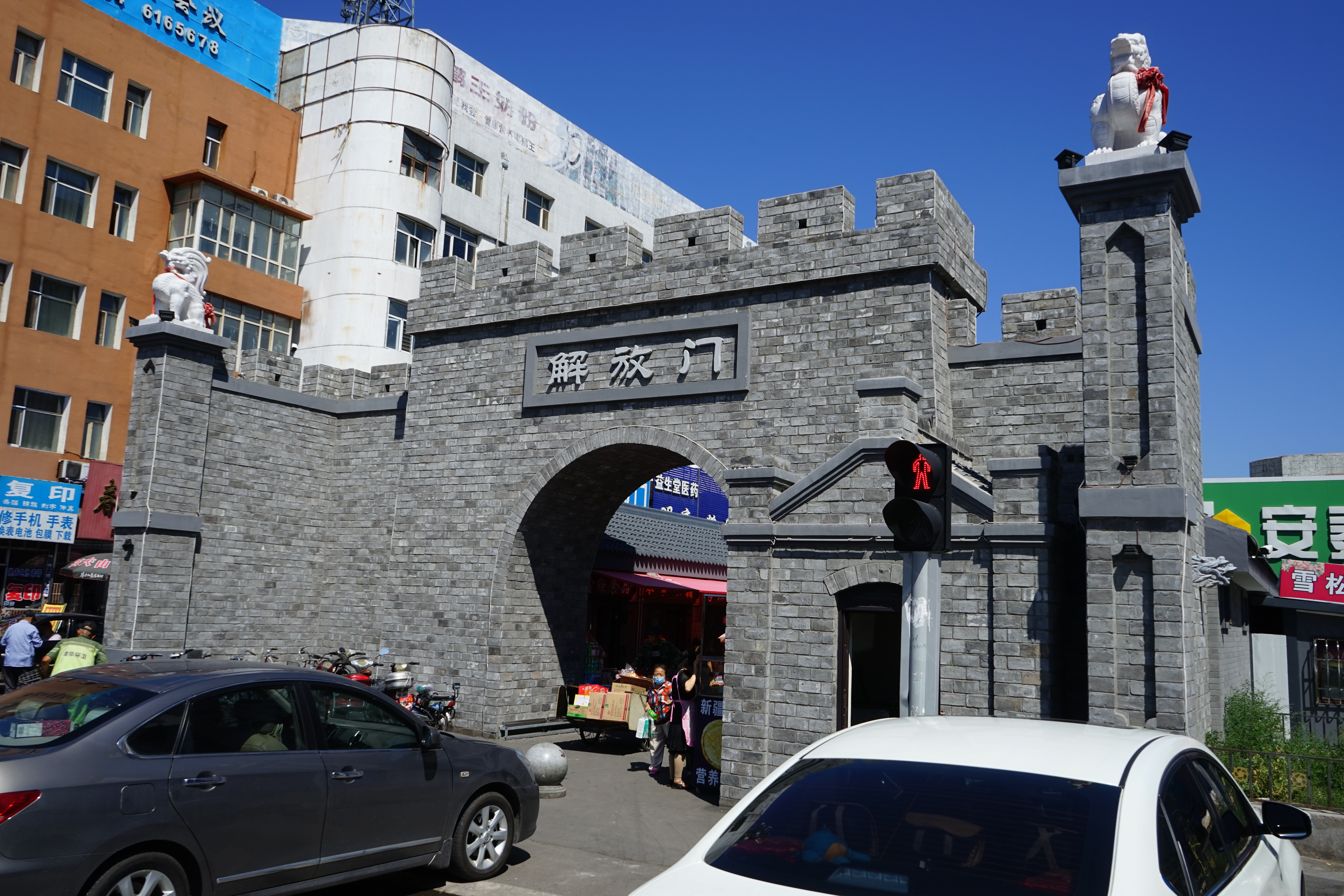 解放门。齐齐哈尔市卜奎大街